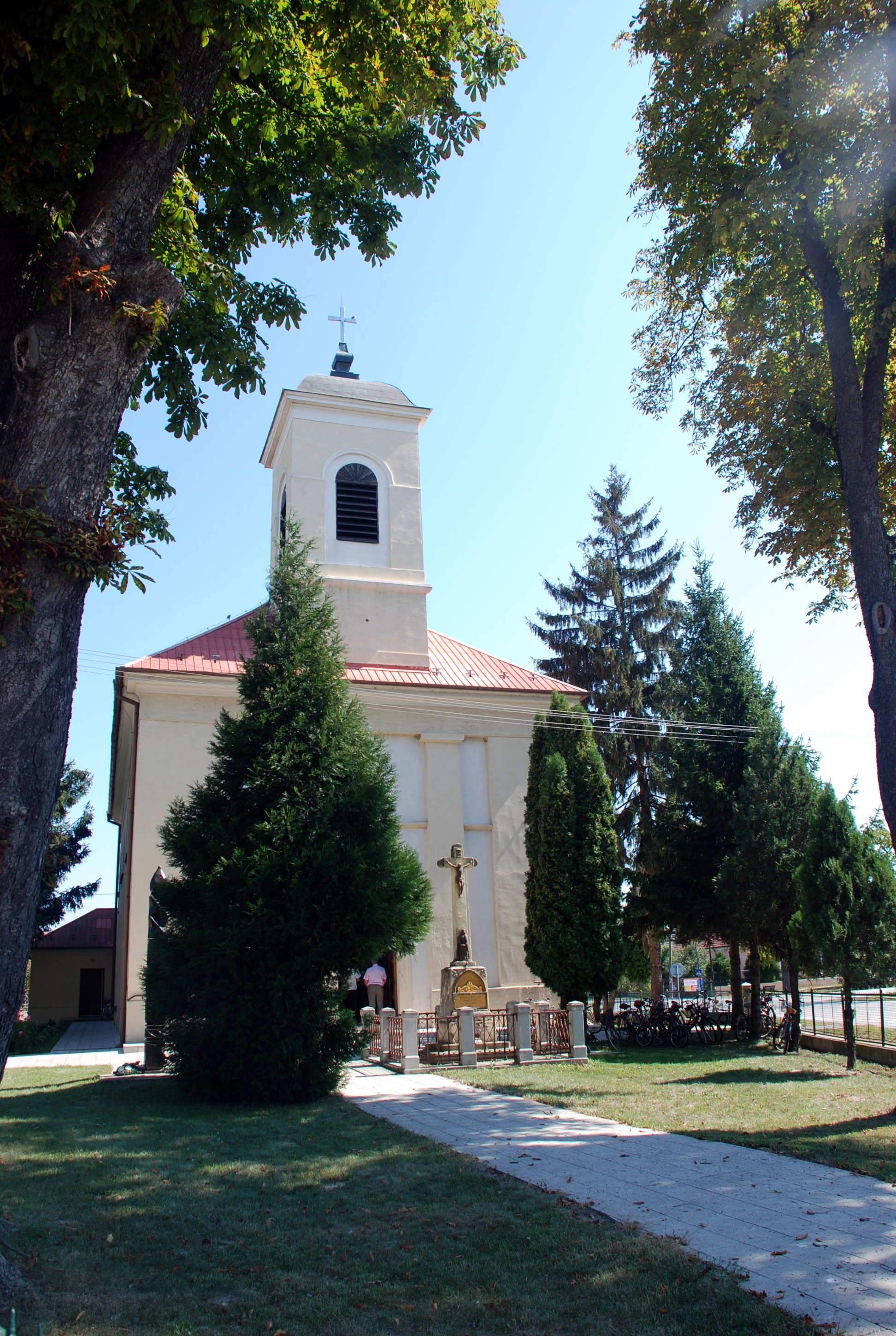 Kráľov Brod - kostol